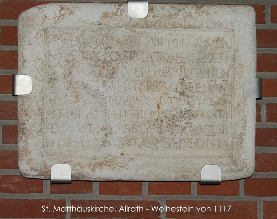 Der Weihestein von 1117 aus der St. Matthäuskirche, Allrath (Grevenbroich).